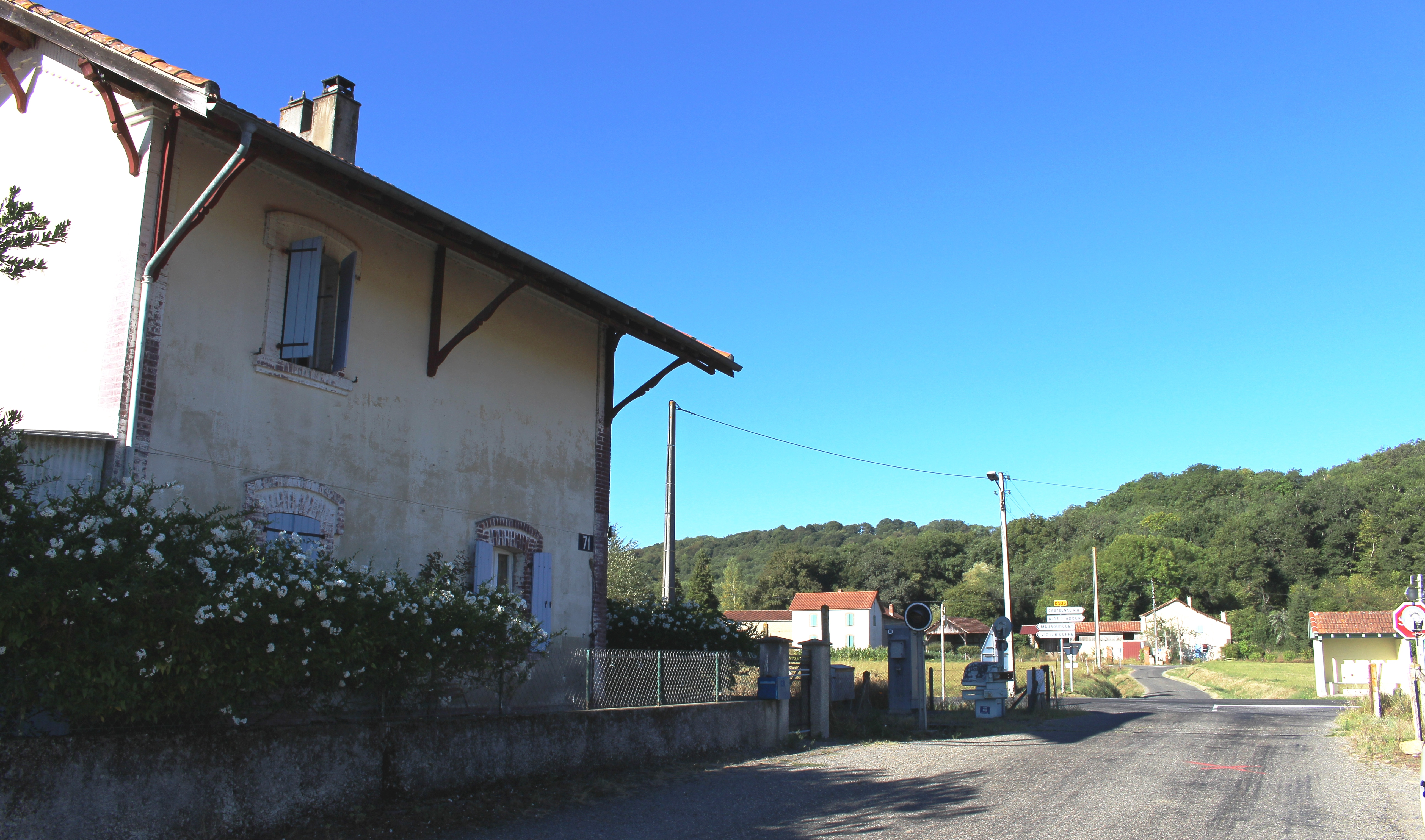 Passage à niveau de Hères (Hautes-Pyrénées)